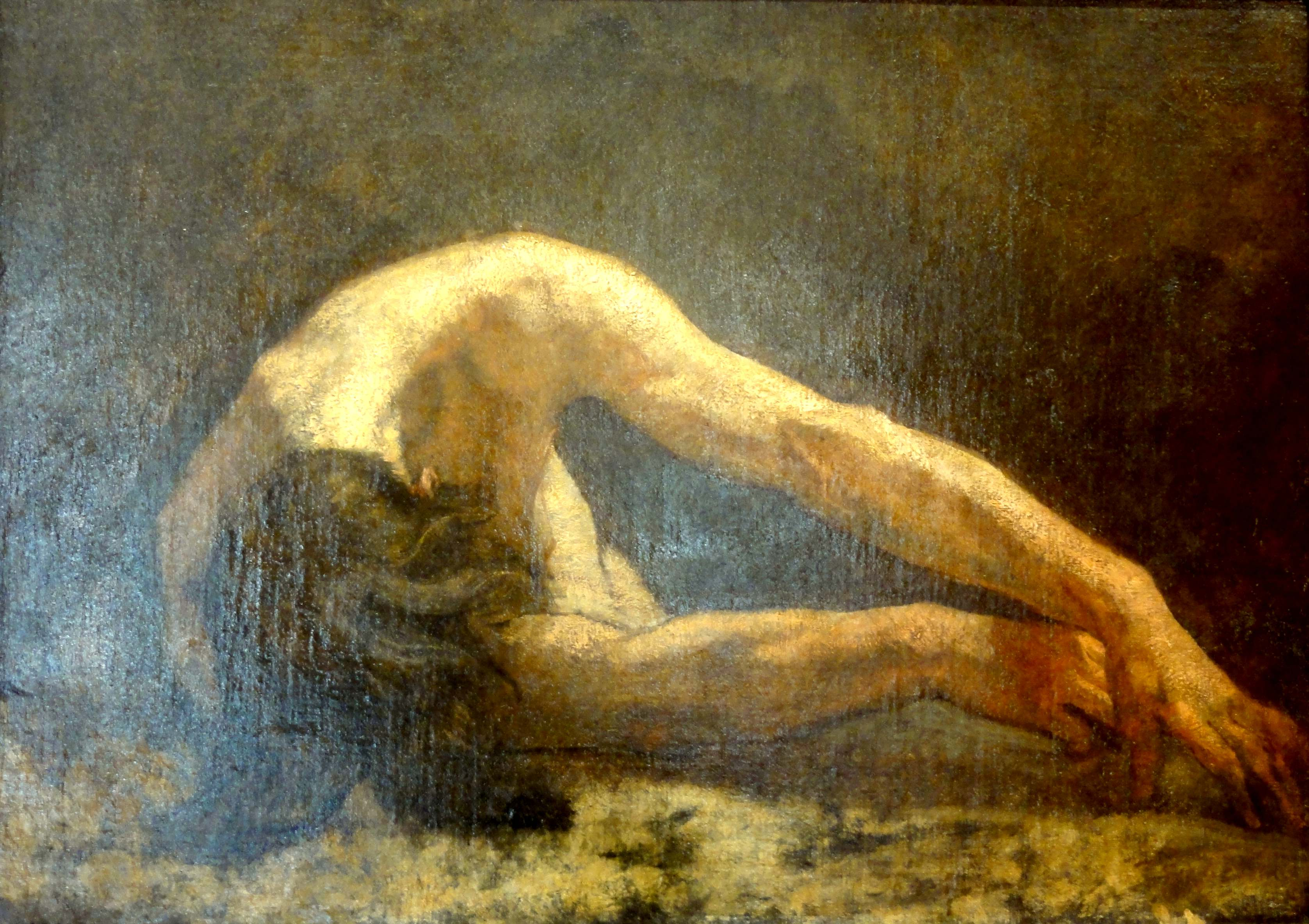 étude pour l'homme échoué de la composition " Stella Maris " (" Etoile de mer "), lunette gauche de la chapelle de la Vierge dans l'église Saint-Eustache à Paris.